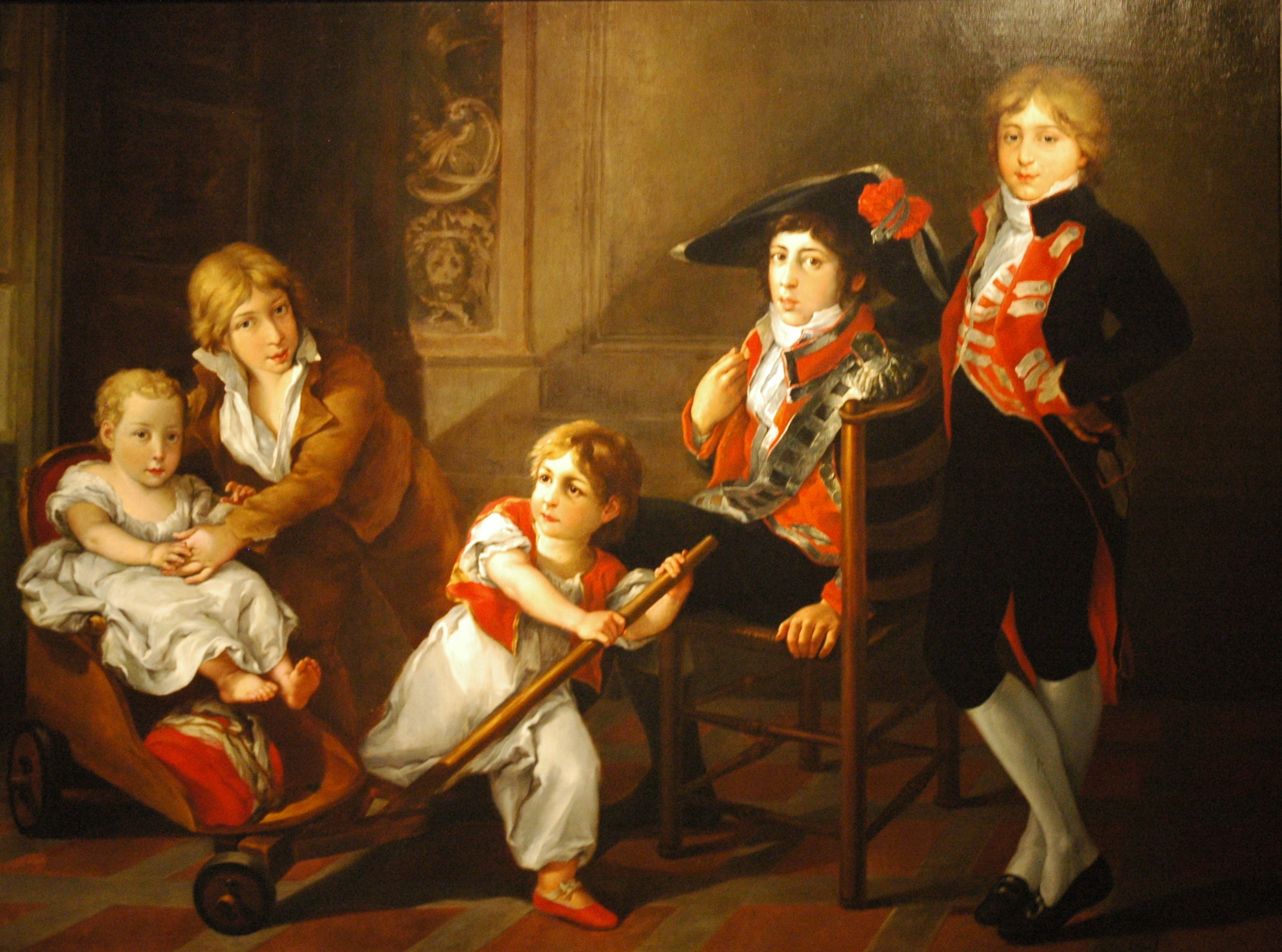 Les Enfants du Comte Casa Florez de Vicente Lopez y Portaña (1828)